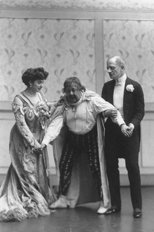 Berlin, Fritzi Massary im Metropoltheater Zentralbild 2944-42 Fritzi Massary Sängerin und Schauspielerin, geb. 31.3.1882 in Wien, (links), und Joseph Giampetro, Charakterkomiker - geb. 21.6.1866 in Wien, gest. 29.12.1913 in Berlin (rechts), in der Operette "Maxim" im Berliner Metropoltheater. Abgebildete Personen: Massary, Fritzi: Operettensängerin, Österreich (PND 118731572) Giampietro, Joseph: Schauspieler